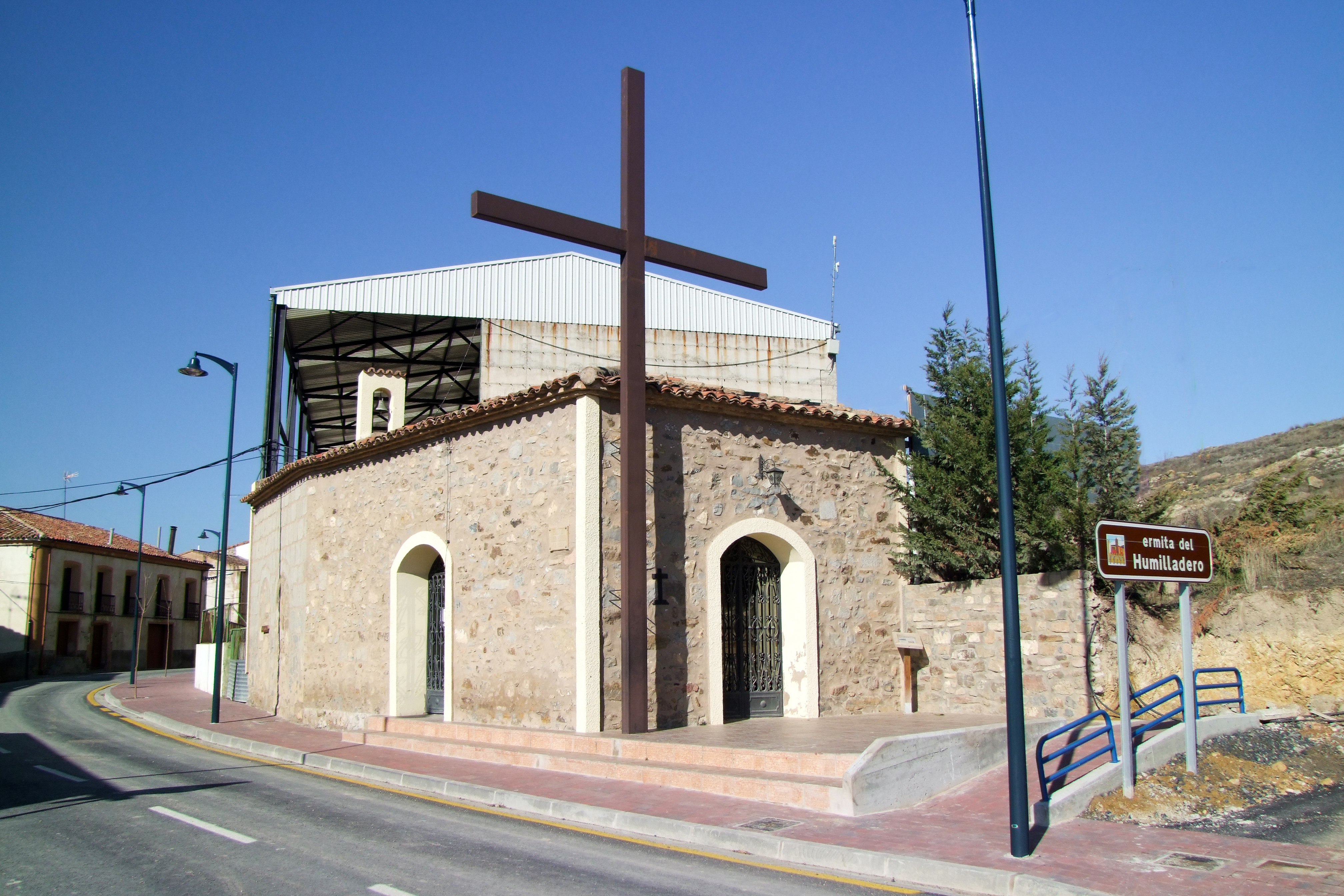 Ermita del Humilladero en la localidad de Gravalos, La Rioja - España